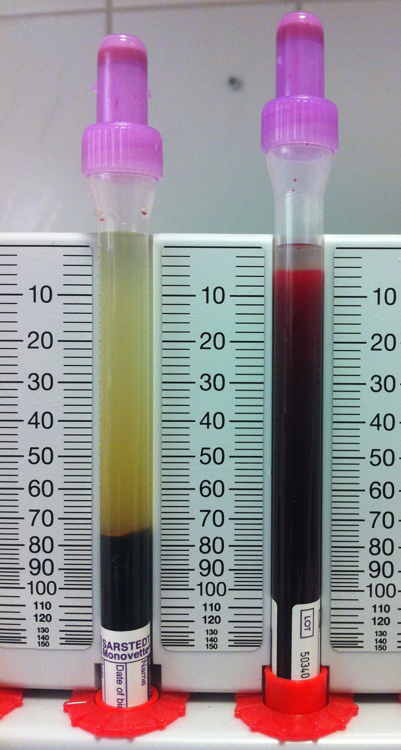 Erhöhter BSG-Wert (links) von 76 mm in 2 Stunden bei einem 25-jährigen Patienten mit atypischer Pneumonie. Rechts zum Vergleich sieht man eine nicht pathologisch erhöhte BSG.